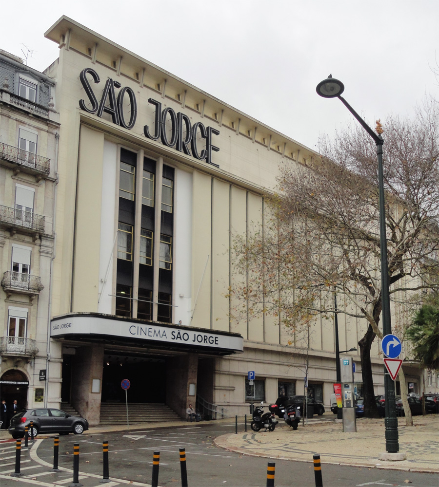 Cinema S. Jorge, Av da Liberdade, Lisboa; Arq. Fernando Silva